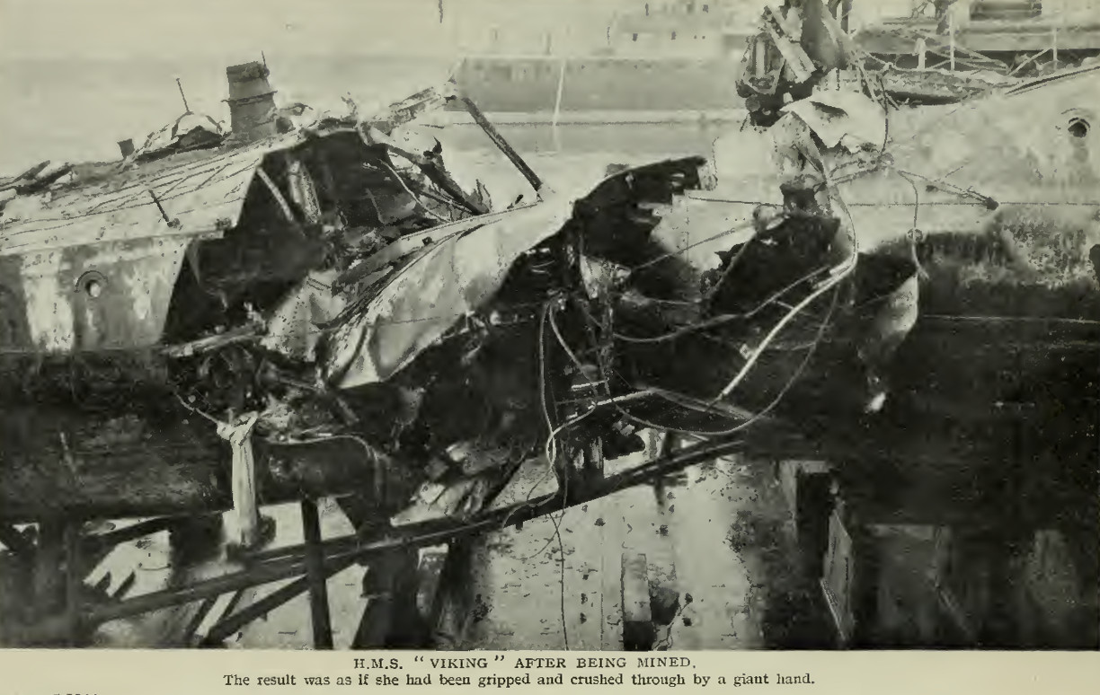 Der Minenschaden der HMS Viking